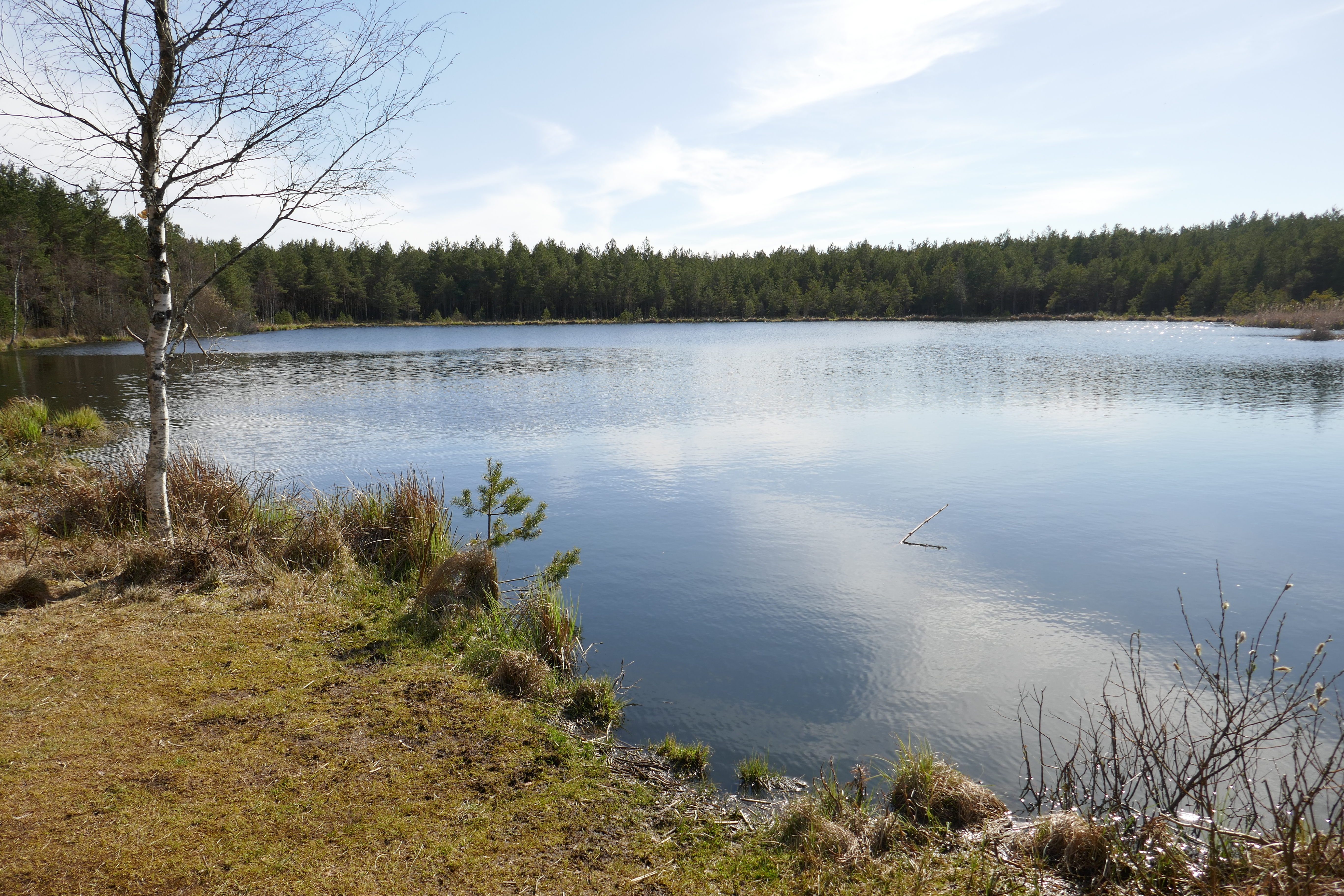 Aruaru külas asuv Kiiajärv 2020. aasta maikuus.